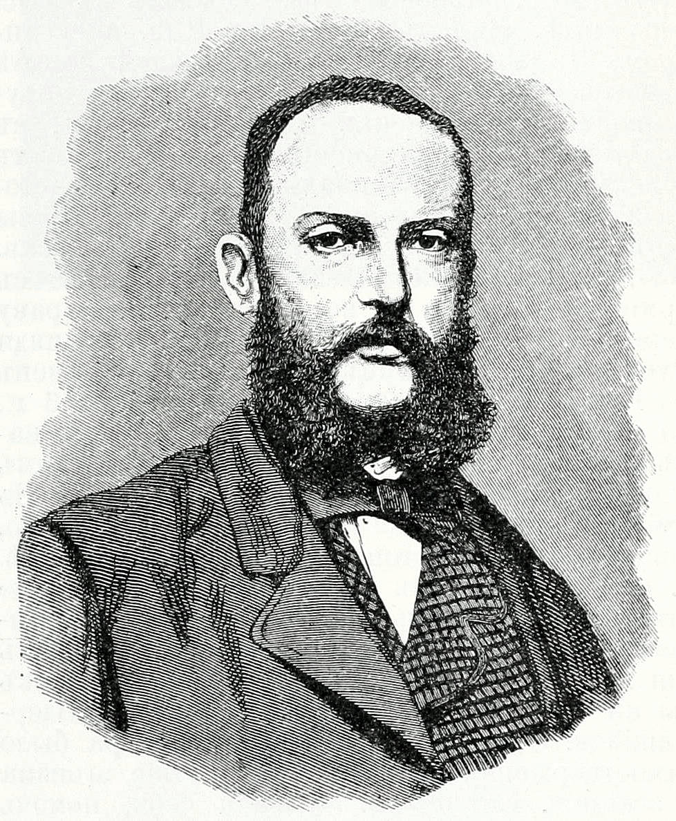 Это изо было использовано в статье «Горшельт, Теодор» опубликованной в восьмом томе «Военной энциклопедии», который был издан книгоиздательским товариществом И. Д. Сытина в 1912 году в столице Российской империи городе Санкт-Петербурге.